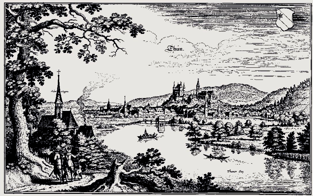 Thoune vue depuis l'exutoire du lac de Thoune dans l'Aar.